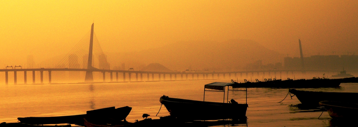 Hong Kong-Shenzhen Western Corridor, view from Lau Fau Shan